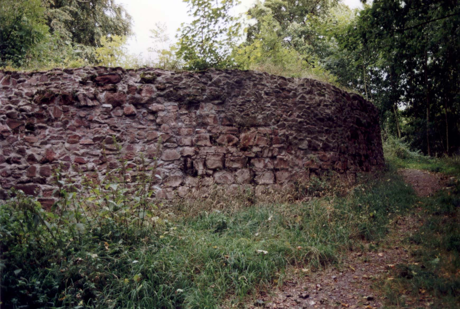 Ilburg, Reste der westlichen Umfassungsmauer der Kernburg